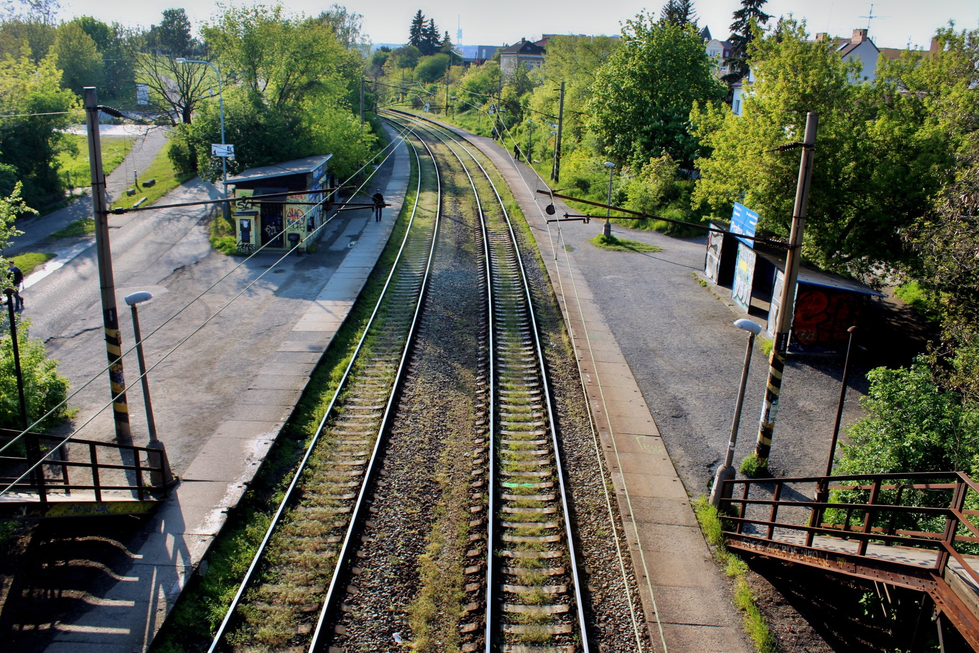 Praha-Strašnice zastávka